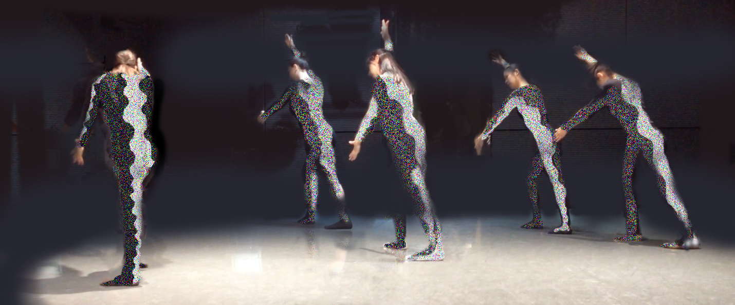 Photo de plateau